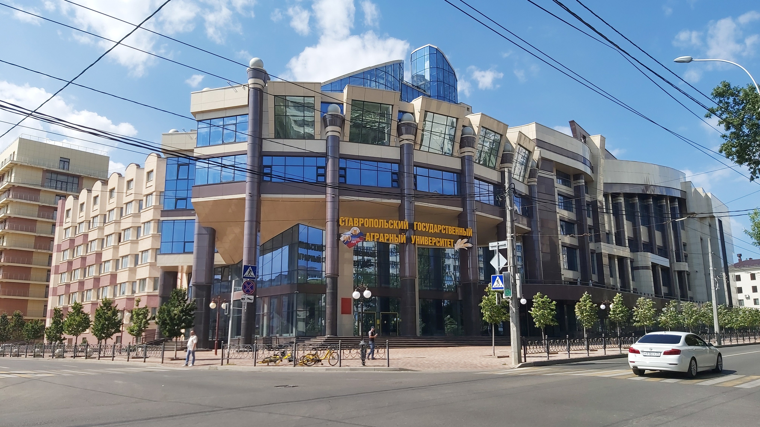 Сельскохозяйственный университет Ставрополь